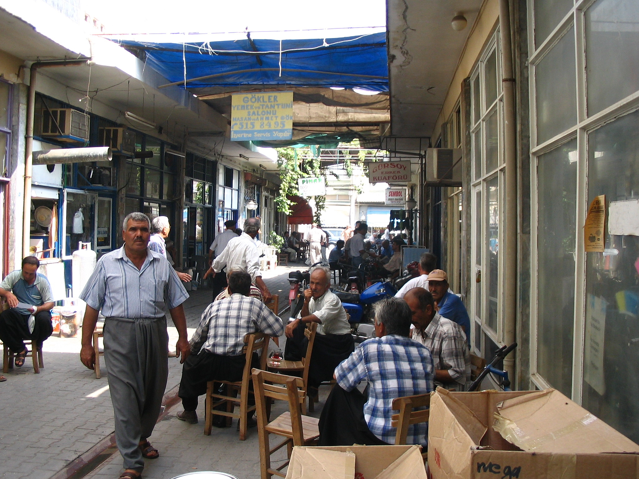 Gasse in Erdemli, Südtürkei